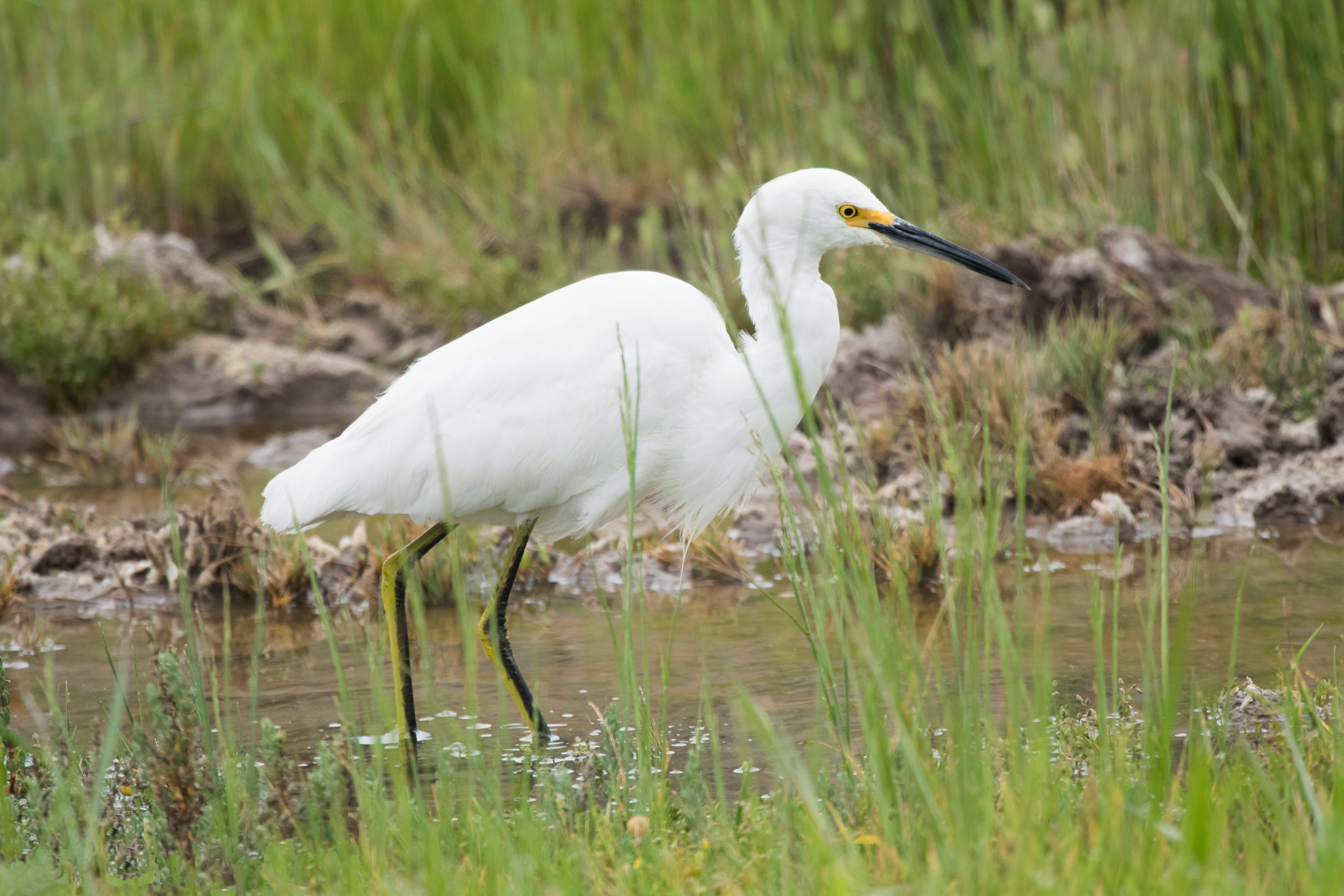 Garceta nivea fotografiada en el Humedal de Batuco, Región Metropolitana, Chile